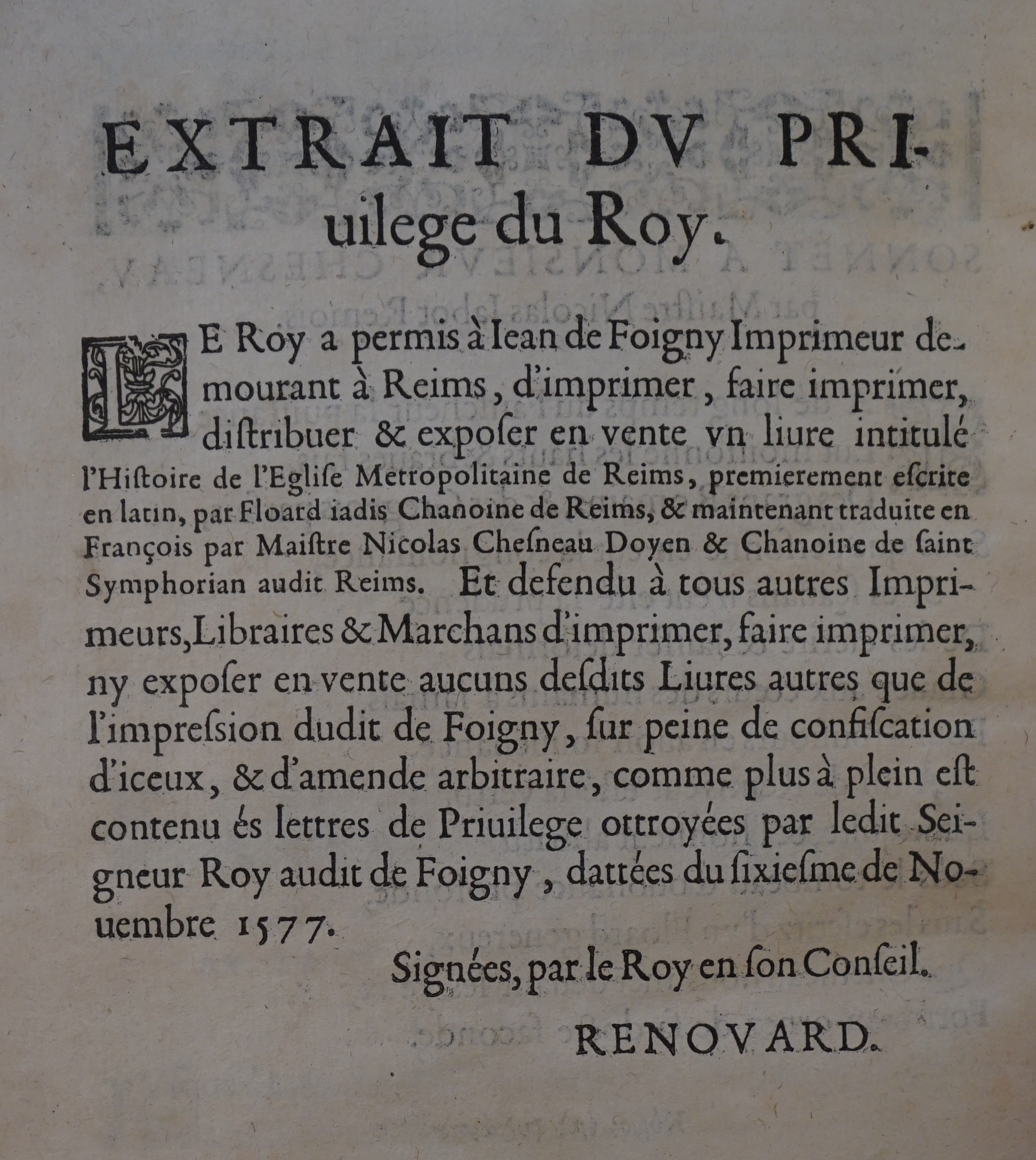 extrait du livre